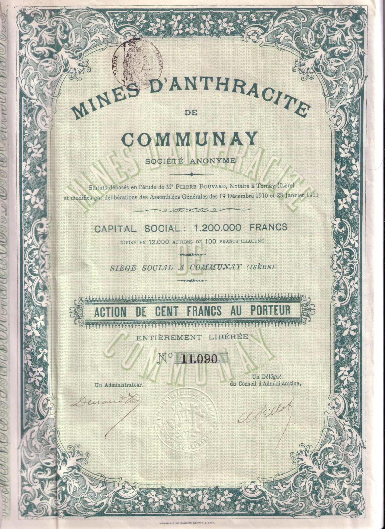 Action de Mines d`Anthracite Isère Communay 19 dec 1910